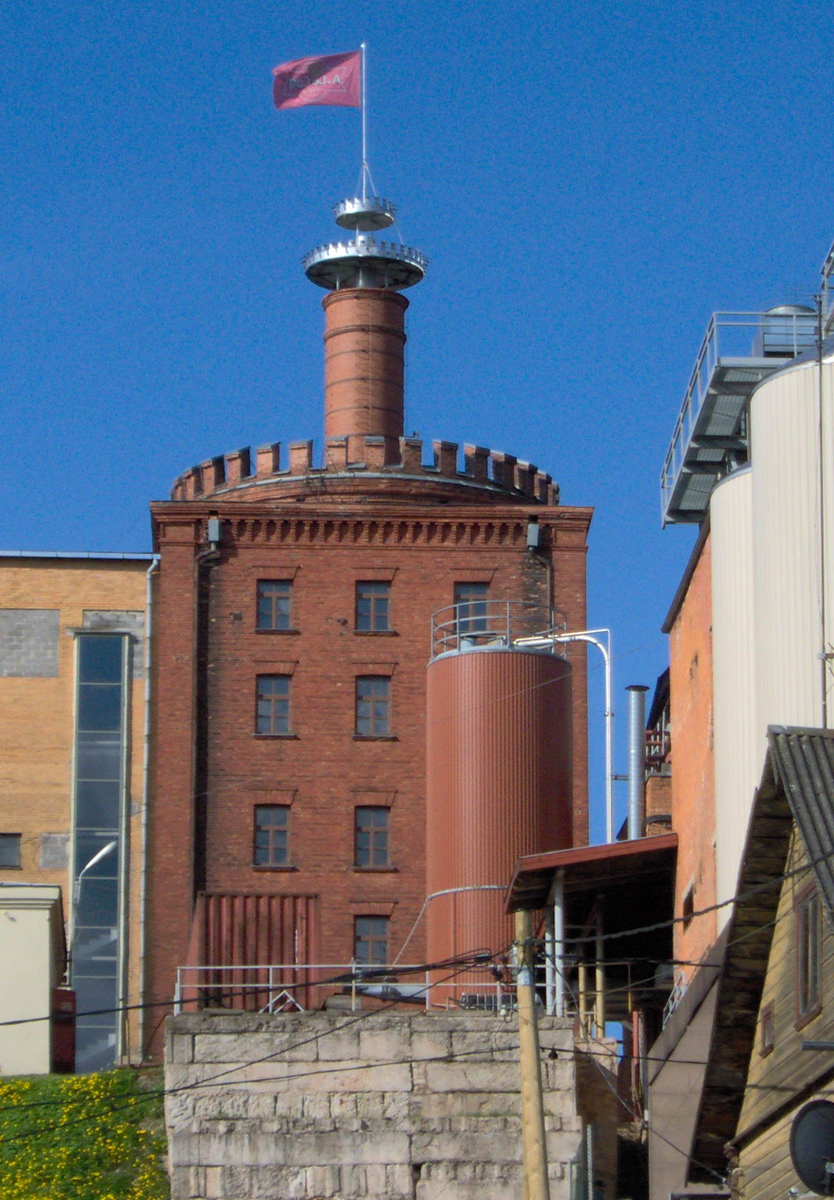 A. LeCoq Tartu õlletehasUnknown